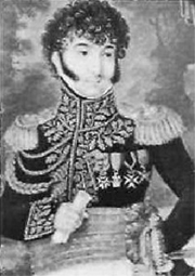 Général_Jean_Marie_Pierre_François_Lepaige_Dorsenne